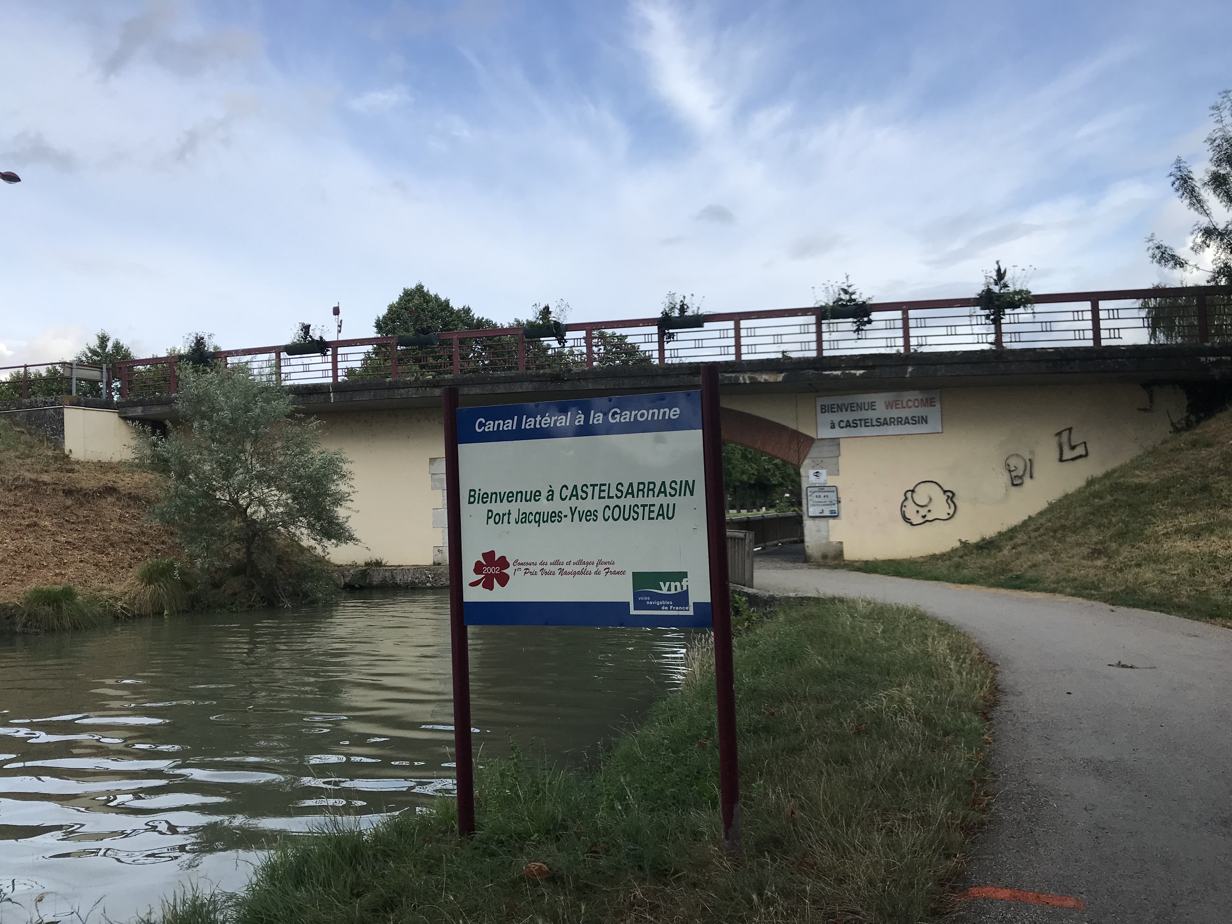 Le canal latéral de la Garonne à Castelsarrasin